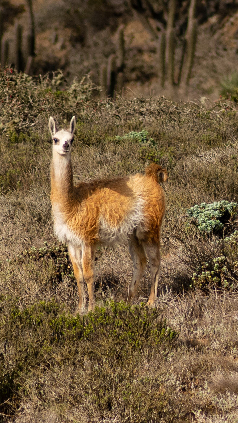 Guanaco en el Parque Nacional Bosque Fray Jorge, ubicado en la Región de Coquimbo